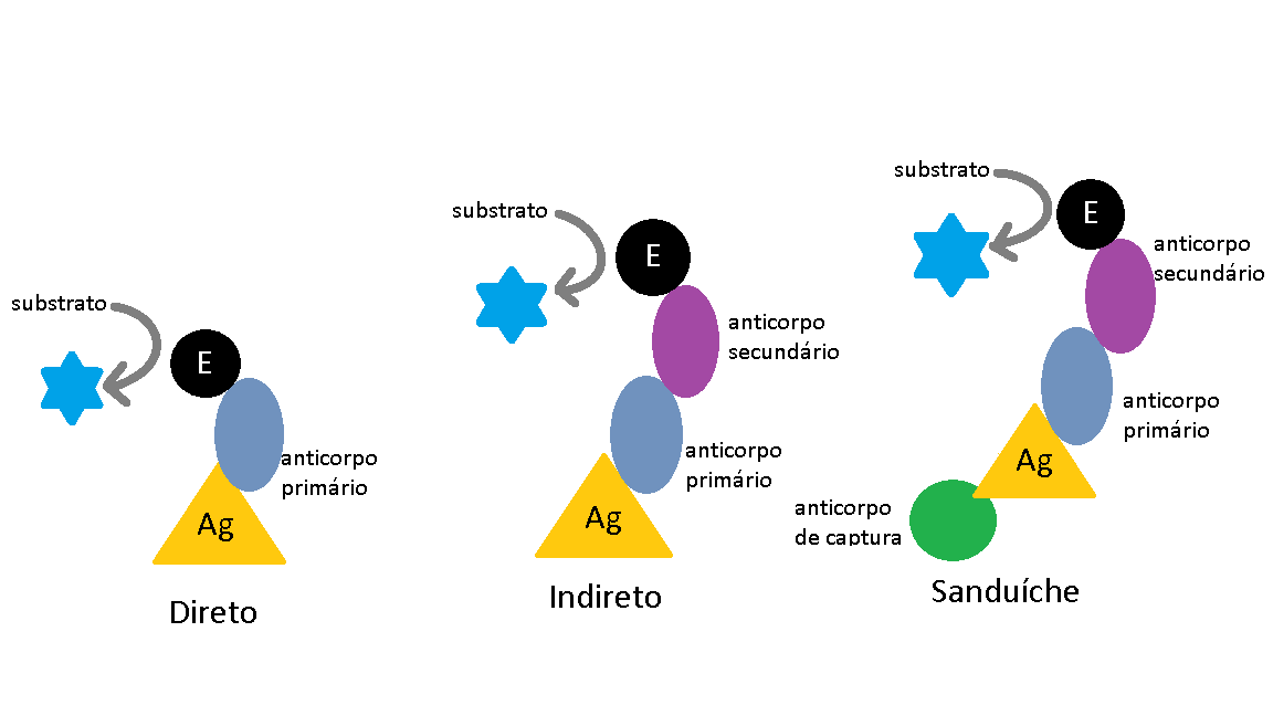 Formatos do ELISA